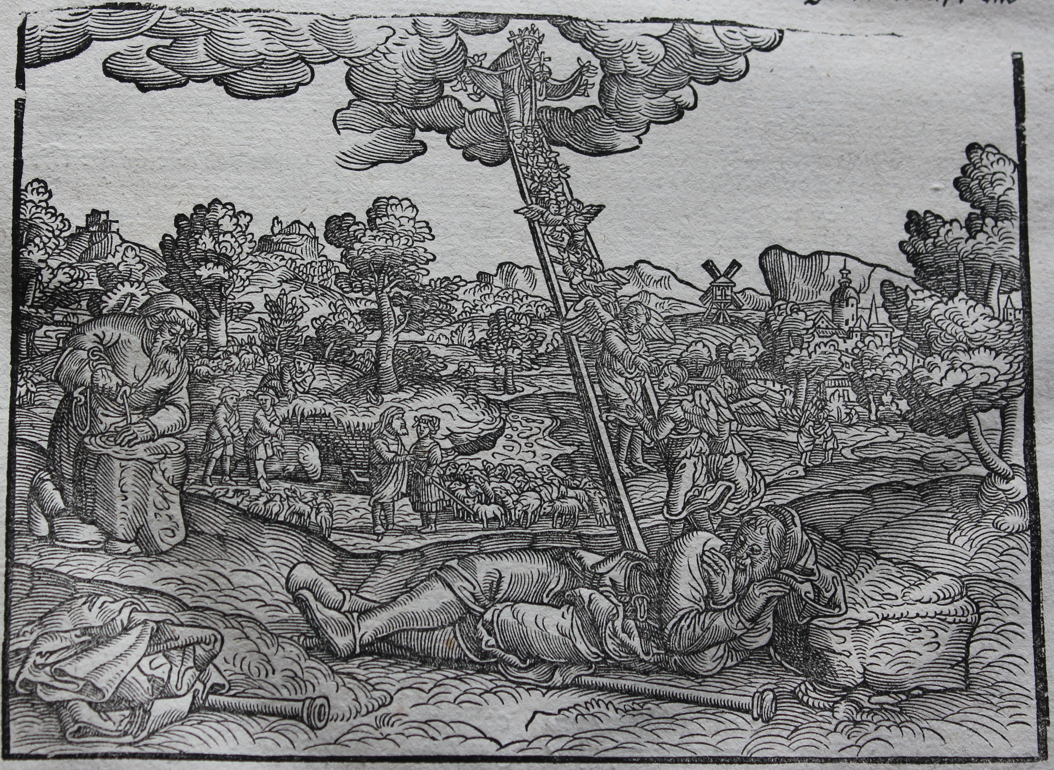 LZB in Flensburg - Niederdeutsche Lutherbibel von 1574-1580, Bild 11B; schon in der Luterbibel von 1534 war die Abbildung abgedruckt